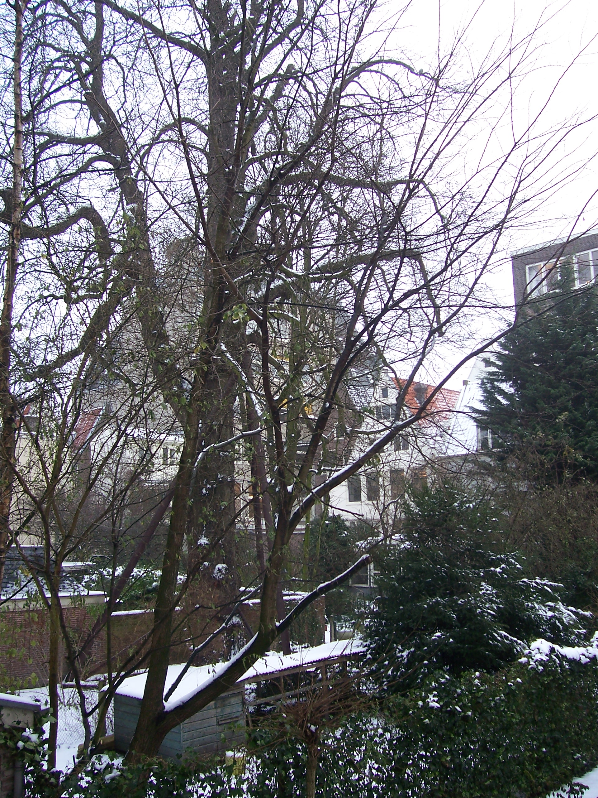 L'arbre d'Anne Frank menacé d'être coupé en 2007. Anne Frank a vu cet arbre depuis la lucarne du grenier de l'Annexe.